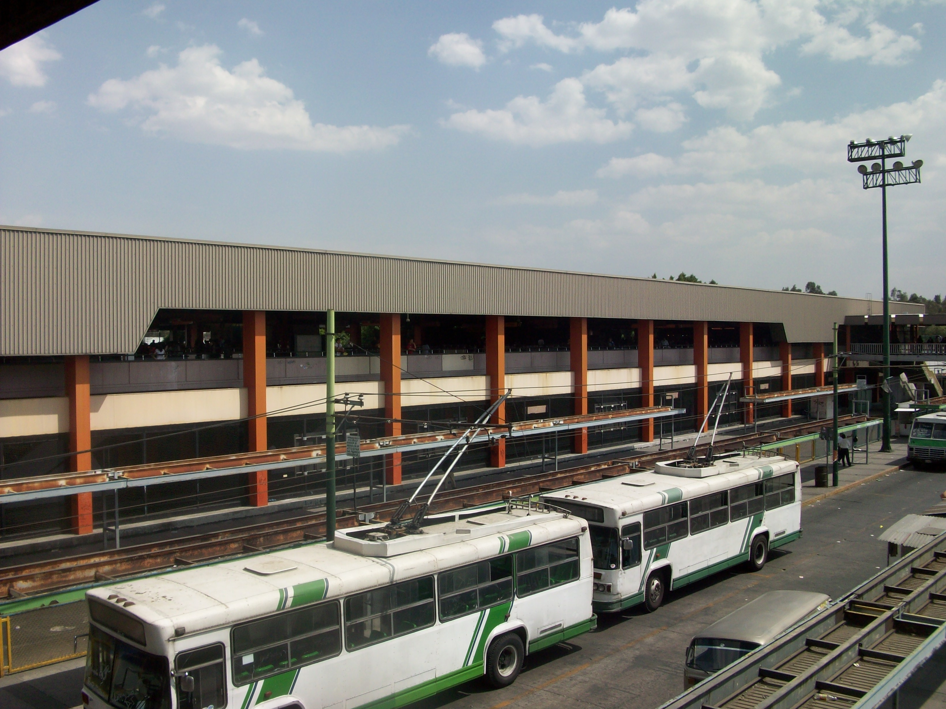 Edificio de la estación El Rosario